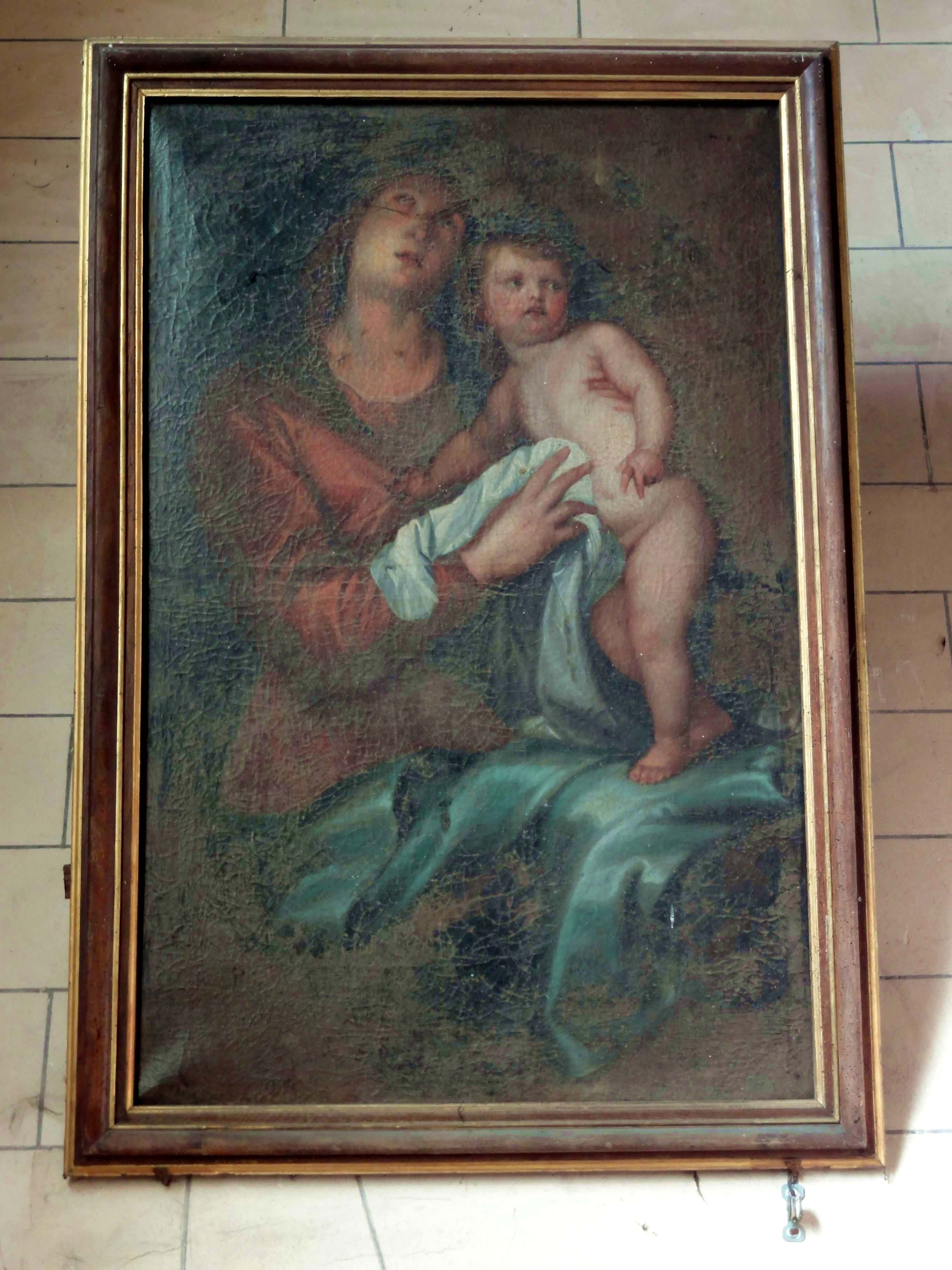 Mobilier de l'église - voir titre.